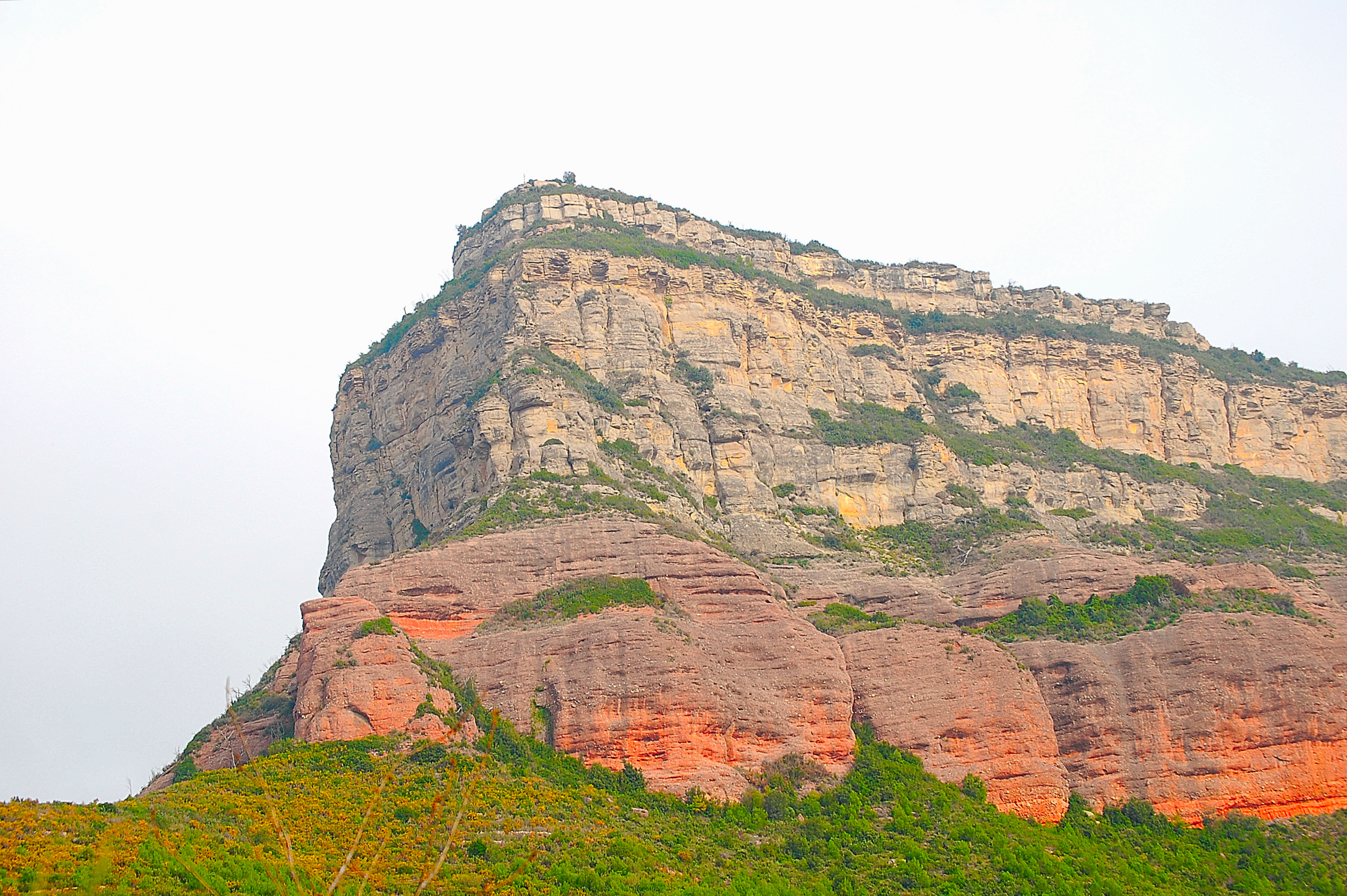 Gallifa-Cingles de Bertí Turo de las once horas en el Cingles del Bertí- Bigues i Riells. El Turó de les Onze Hores o castell d'en Bes, de 760 m d'alçada, és la punta d'un cingle que, vist des de Riells del Fai, sembla un pic ben diferenciat que s'aixeca 350 m per sobre del poble. El turó, igual que tota la cinglera que segueix fins al coll Tripeta. està format per dos cinturons de roques de diferent constitució. El primer és una roca vermellosa formada per conglomerats del paleocè de l'era terciària i el segon per gresos blanquinosos marins de l'eocè de l'era terciària. This is a photography of a Site of Community Importance in Spain with the ID: ES5110008. Natura2000 entry, EEA entry